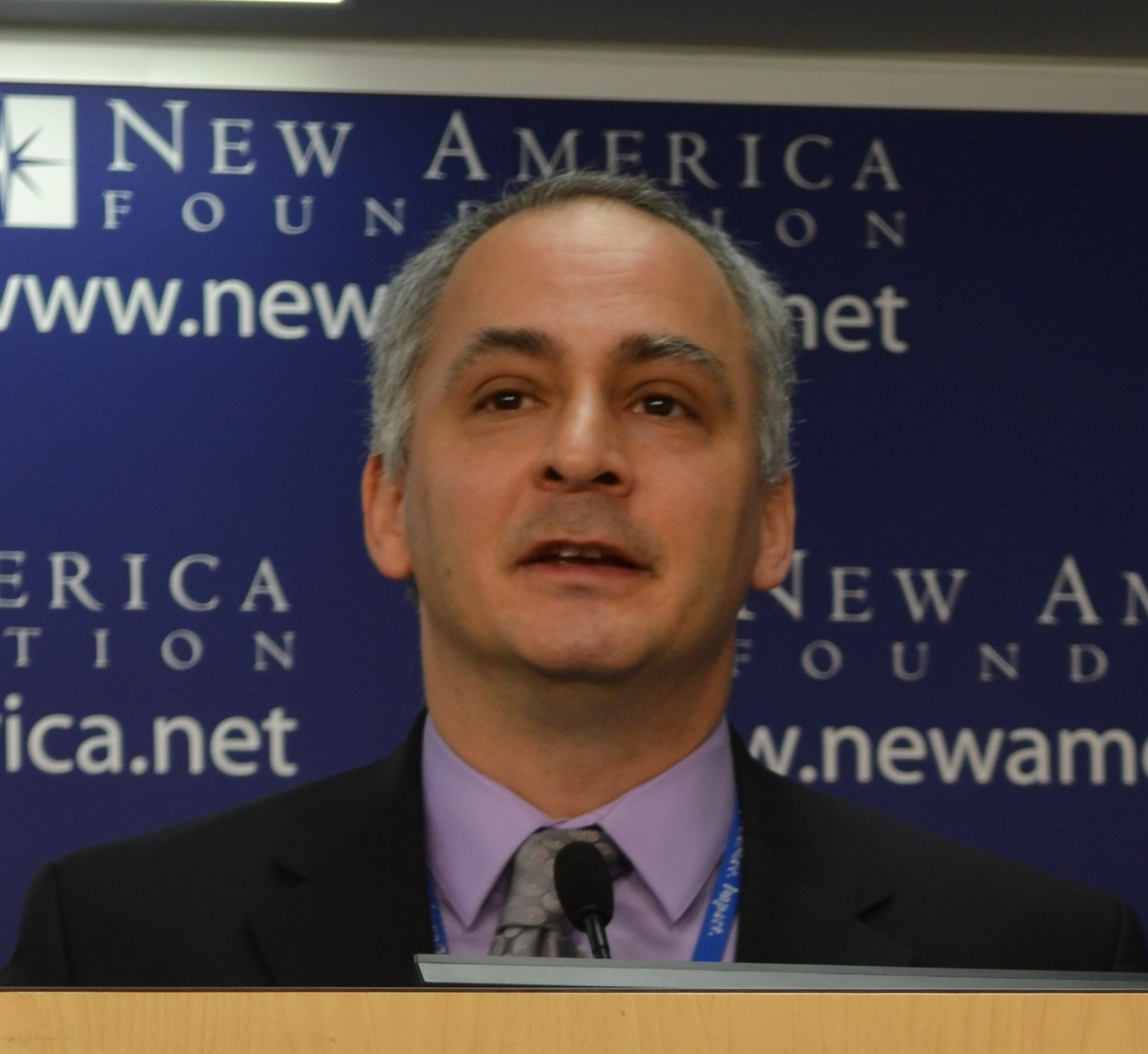 Benjamin Wittes